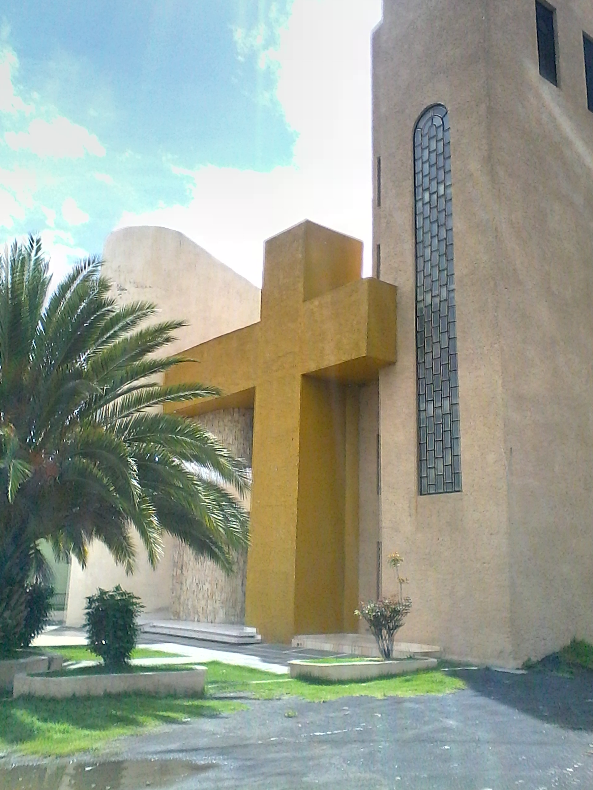 Templo principal de cantabria